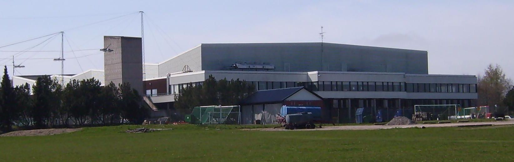 The ice hockey rink “Himmelstalundshallen” in Himmelstalund, Norrköping, Sverige.